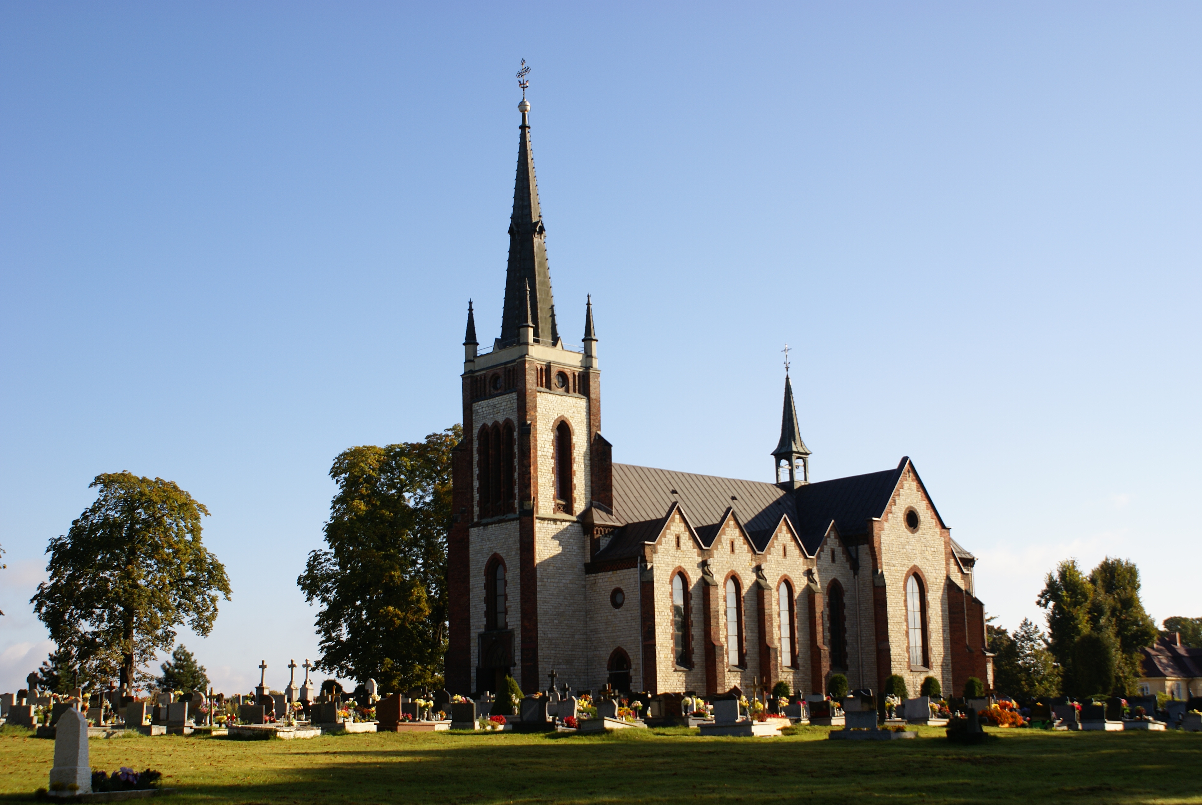 Tarnowskie Góry - kościół parafialny pw. św. Mikołaja wraz z otaczającym go cmentarzem (zabytek nr A/340/11)